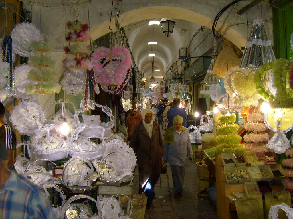 Souk des mariages dans la médina de Tunis (Tunisie)